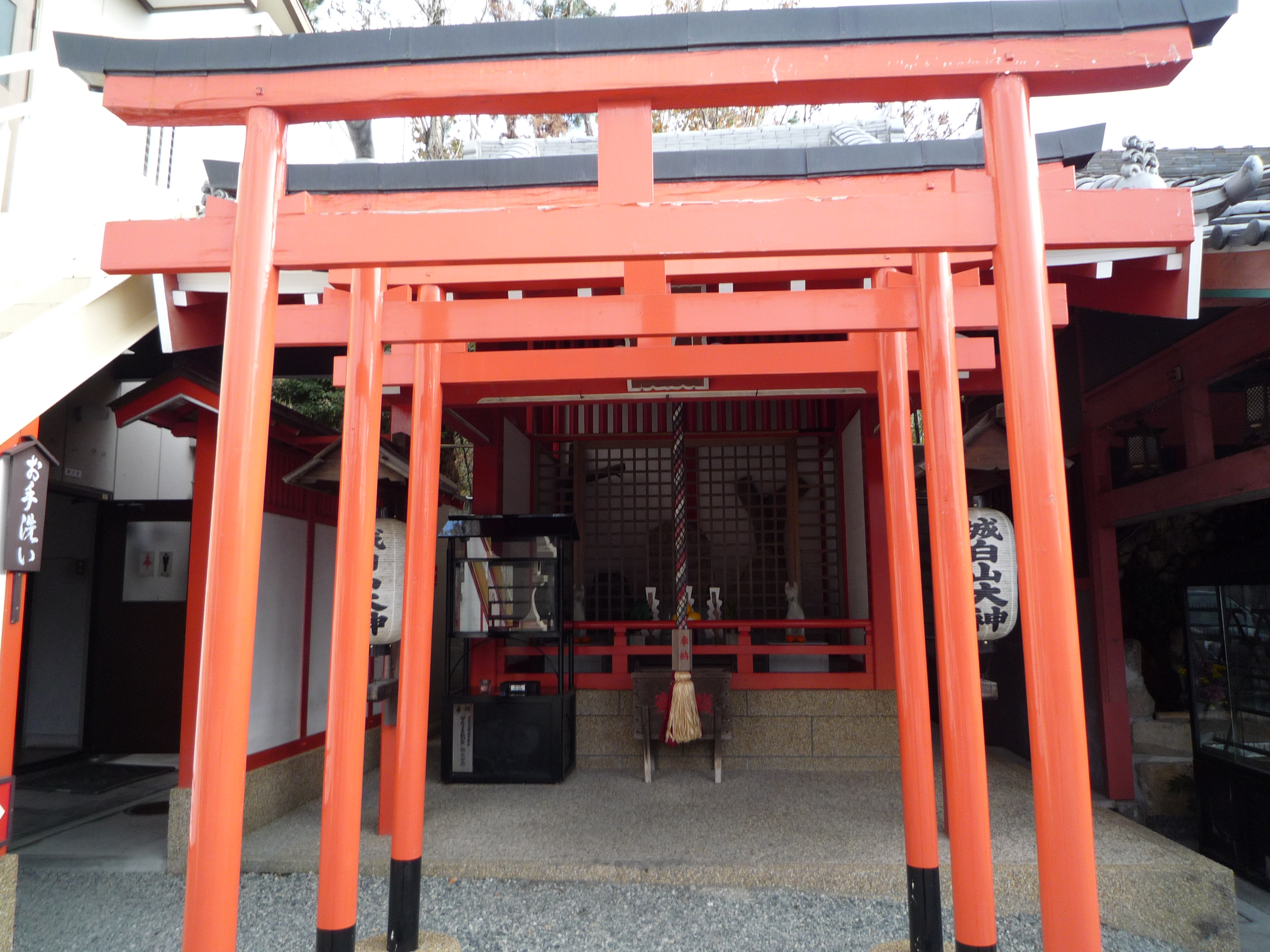 豊中不動尊の城白山大神